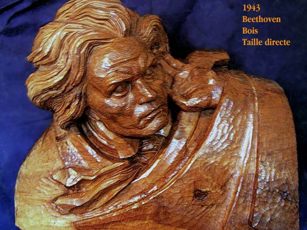 Buste